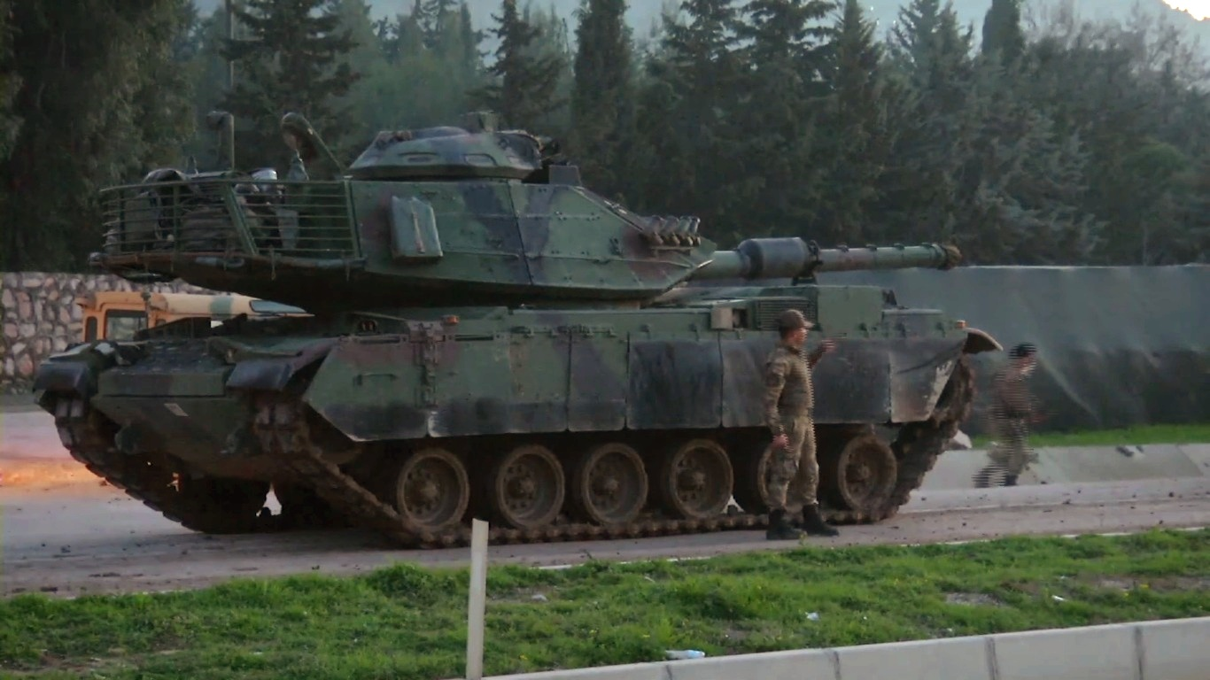 “Zeytin Dalı Harekatı" Afrin’deki hedefleri bombalanmasıyla başladı. Hatay’ın Reyhanlı ve Kırıkhan ilçeleri arasındaki sınır hattında 2. Ordu Komutanlığına bağlı birliklerden gelen çok sayıda tank ve zırhlı araç ikinci bir emre kadar yol boyunca bekletiliyor.